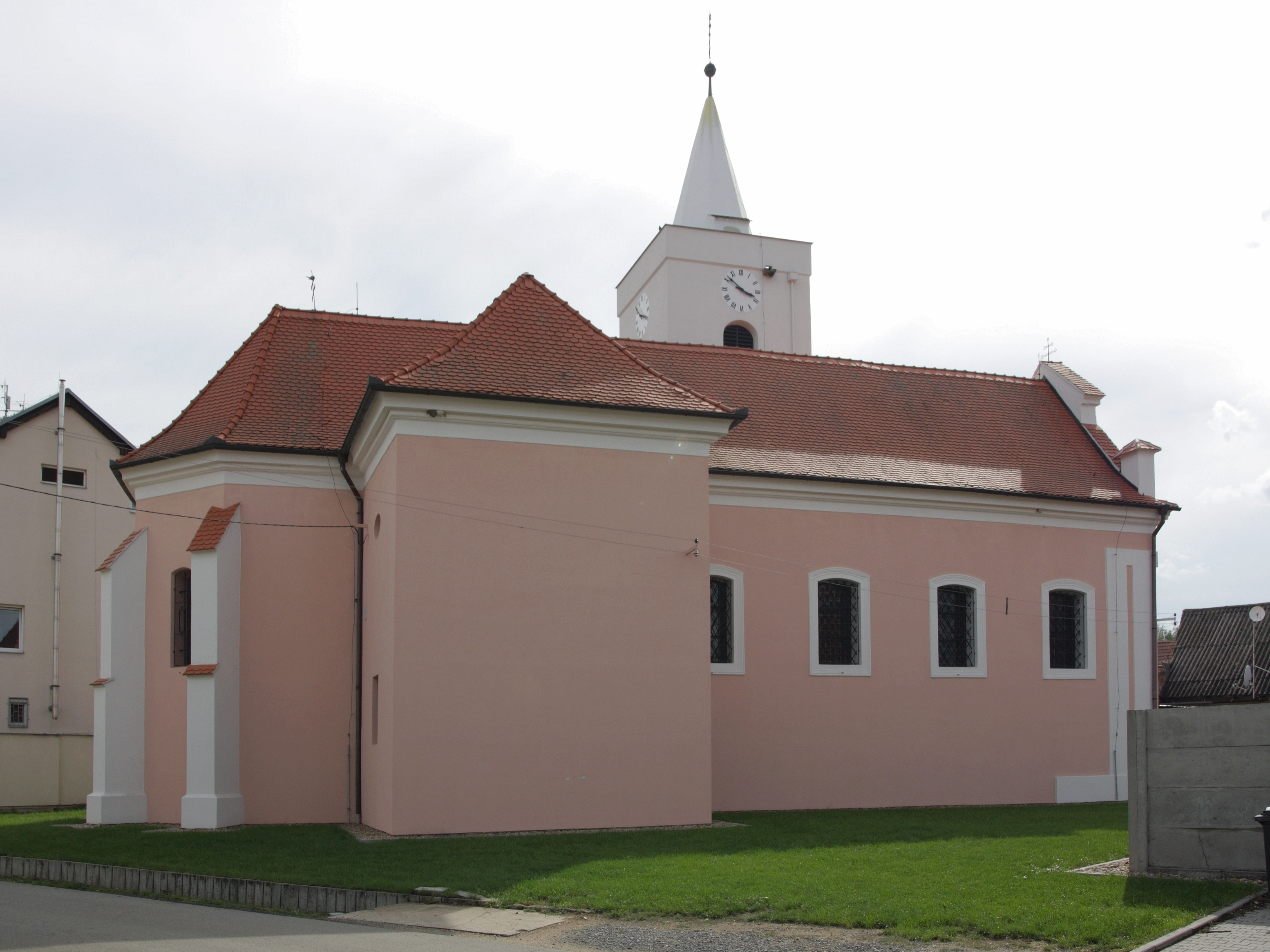 Malešovice - severní strana kostela.